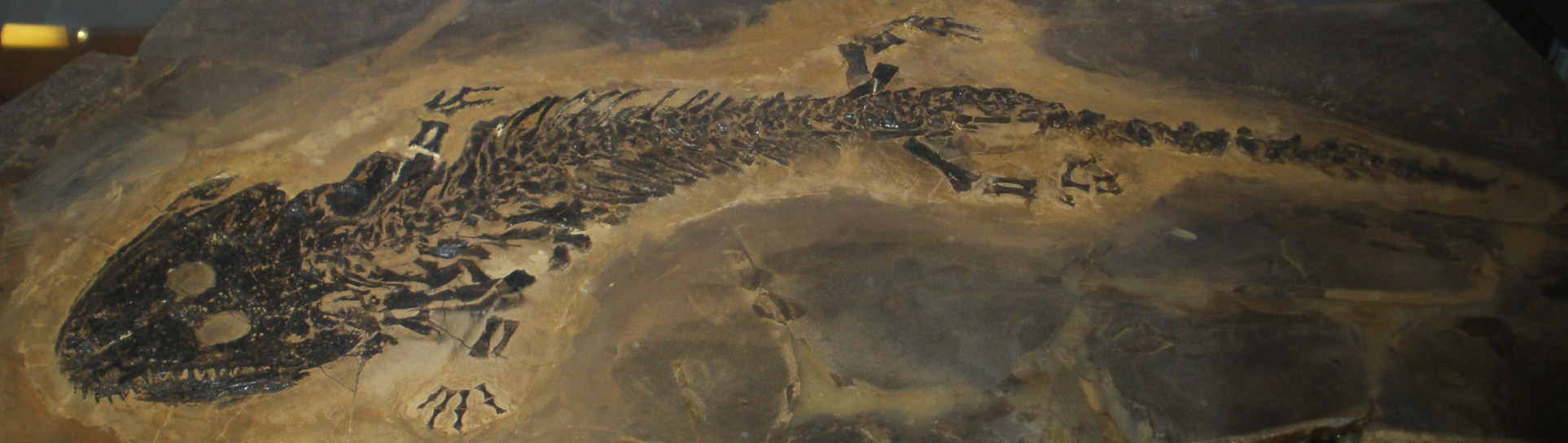 Fossil of Micromelerpeton, an extinct amphibian- Took the photo at Museon museum, Den Haag